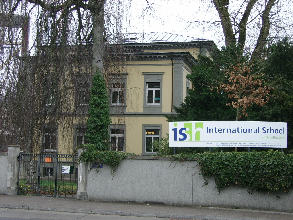 Former International school of Schaffhausen